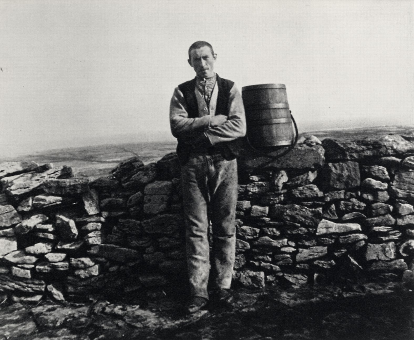 Synge, John Millington: Ein Inselbewohner auf Inishmaan, einer der Aran-Inseln im Westen Irlands